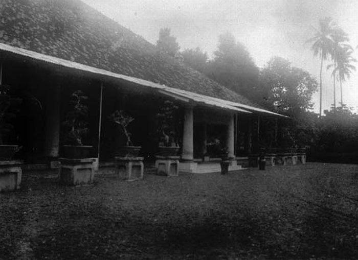 Foto. Villa van de heer Oei Dji San bij Tangerang, West-Java.